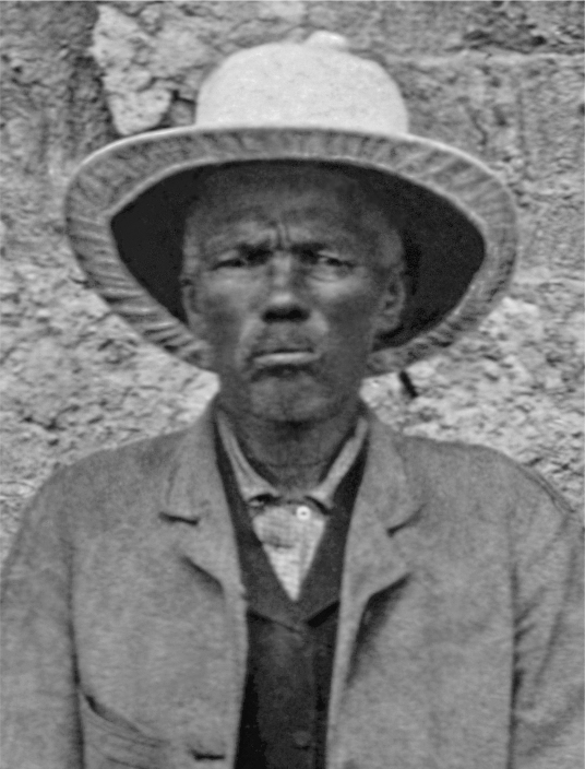 Porträt von Hendrik Witbooi